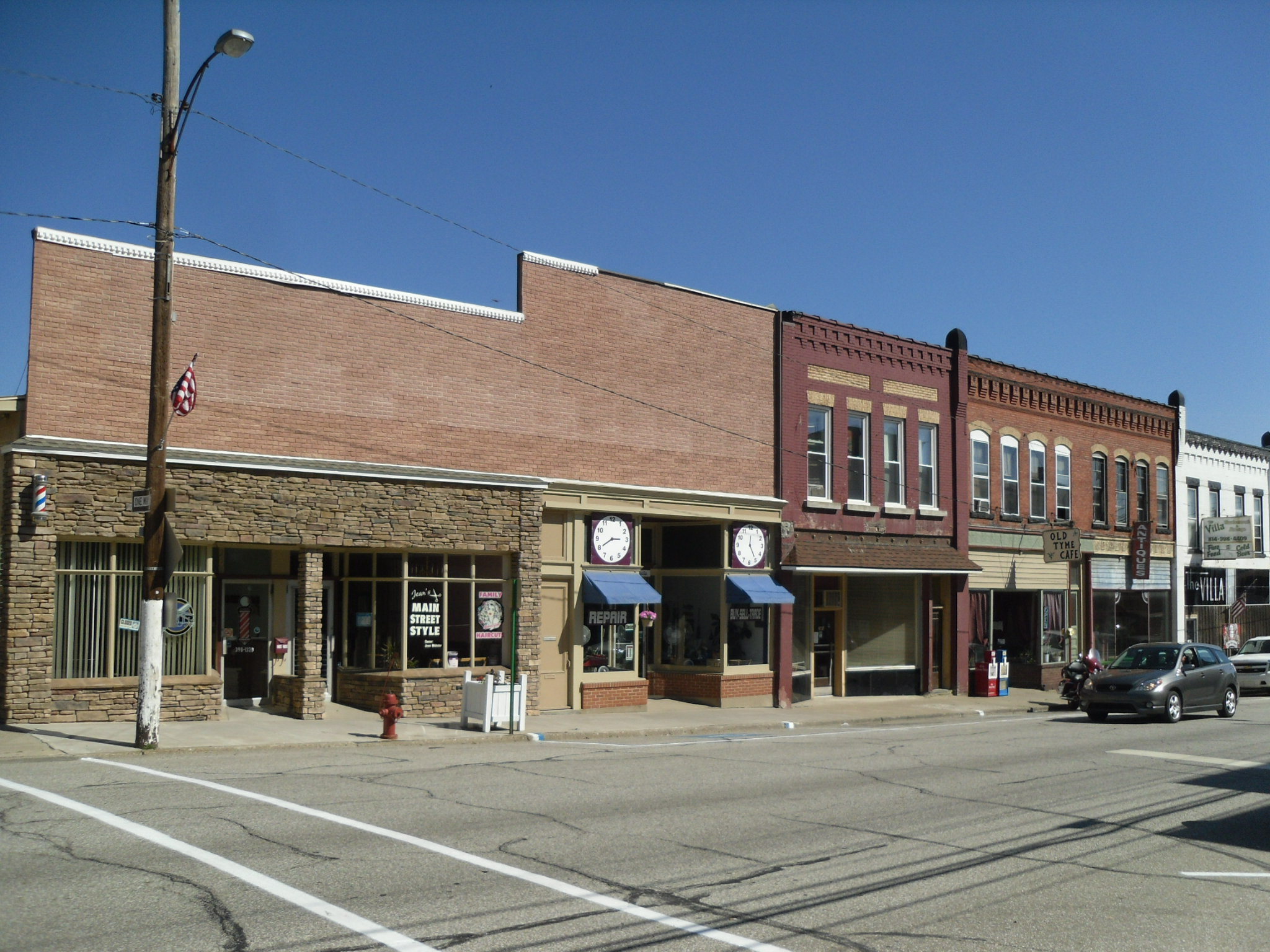 Cambridge Springs, Pennsylvania